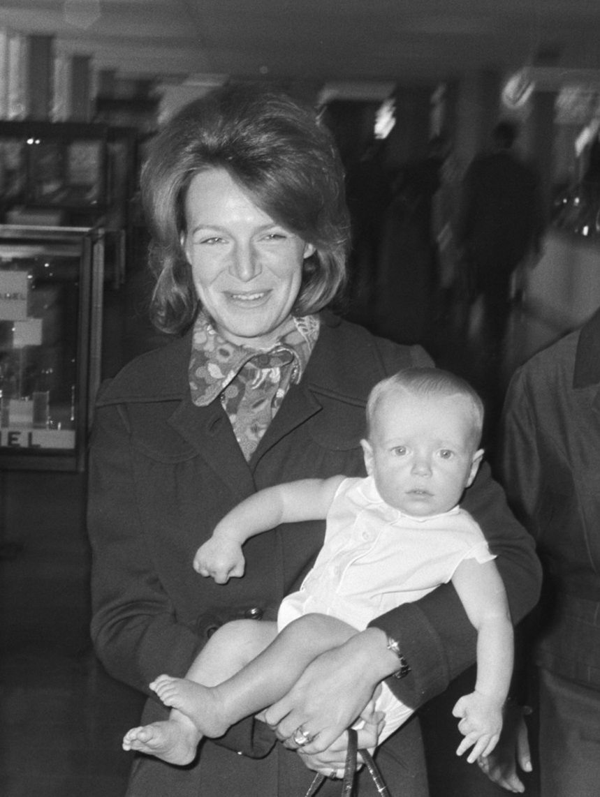 Prinses Irene vertrekt met zoon Prins Carlos van Schiphol naar Madrid.